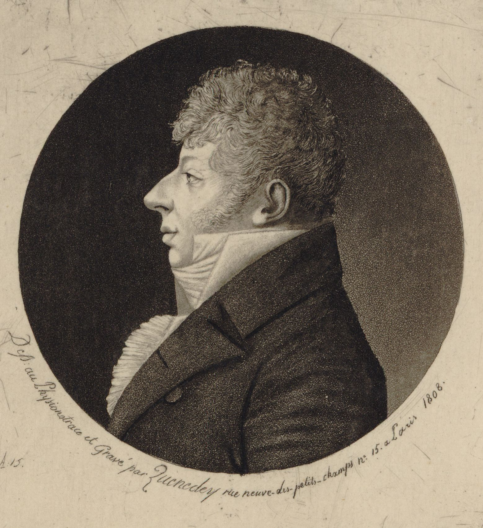 Auguste Kreutzer, dessiné au physionotrace et gravé par Quenedey des Riceys